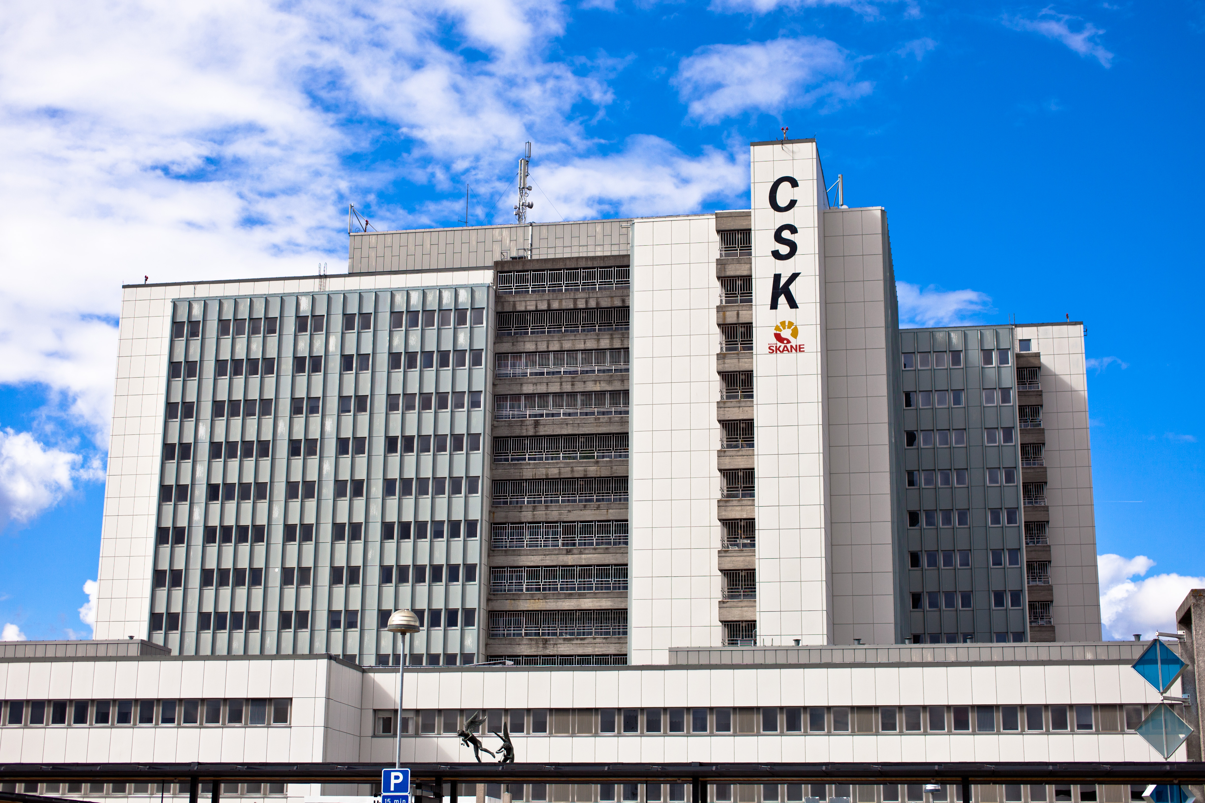 Håkan Dahlström Photography